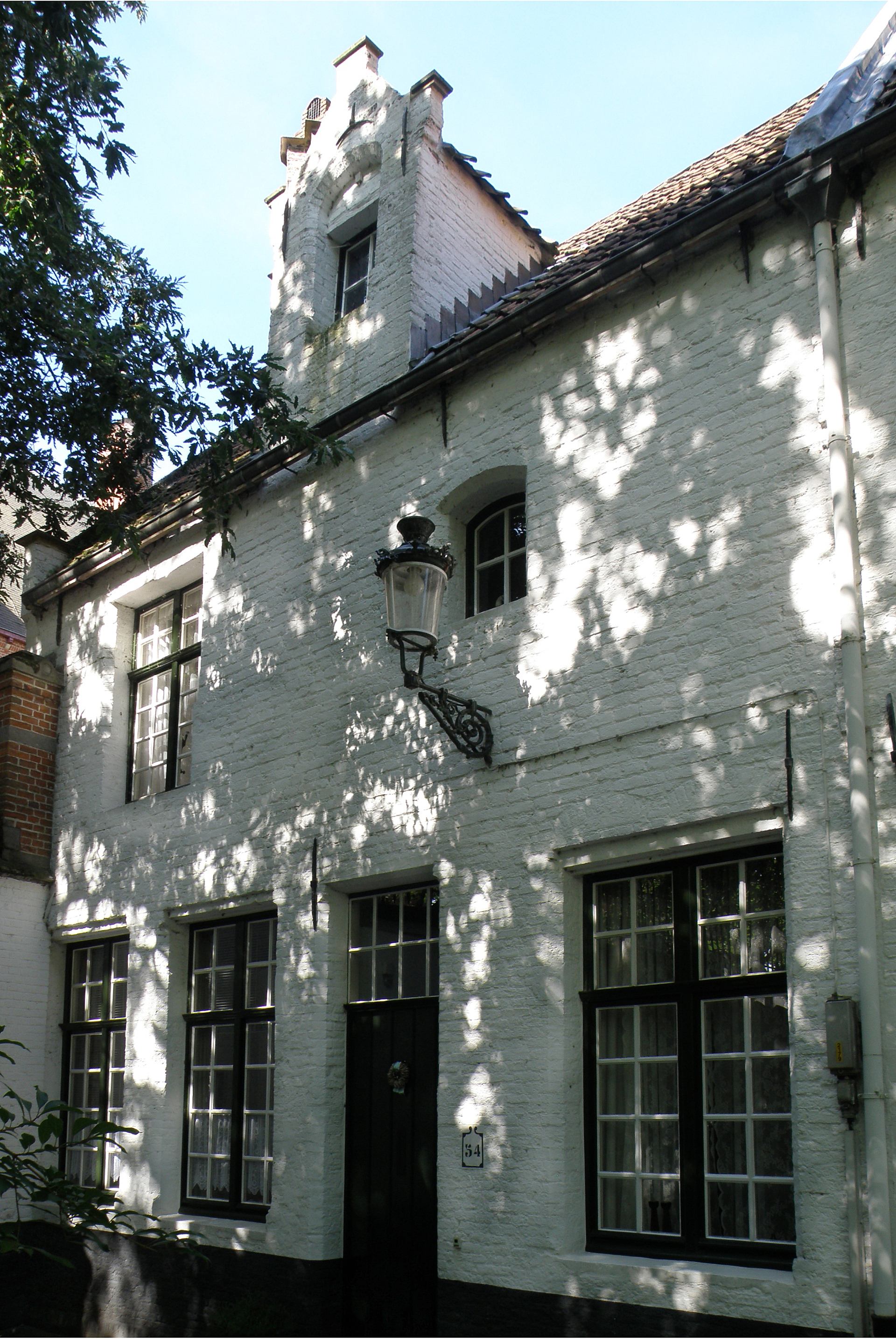 Brugge, Begijnhof. Begijnenhuis nr. 54. Laatste huis van straatje De Steert.